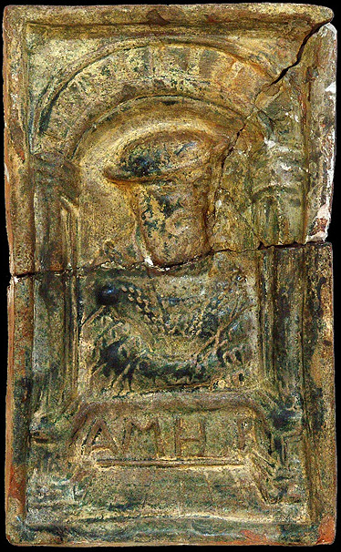 Партрэтная кафля з Лагойска. Old Belarusian History Museum Native nameМузей старажытнабеларускай культурыLocationMinsk, BelarusCoordinates53° 55′ 00.31″ N, 27° 36′ 11.96″ E Established1977Web page control : Q6511262 ISNI: 0000 0001 0791 3038 institution QS:P195,Q6511262